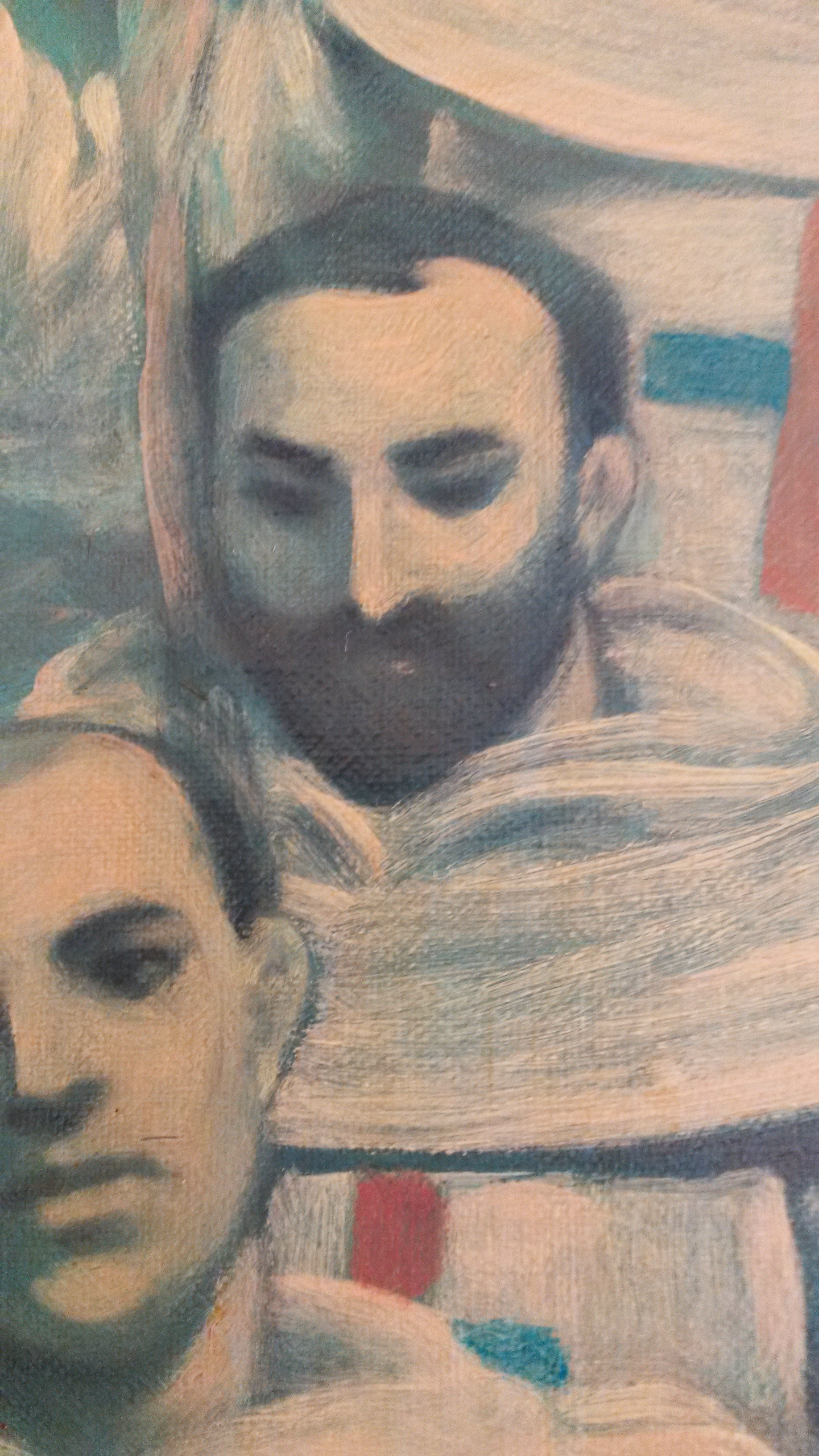 Particular del cuadro de San Hermenegildo de la Asunción y compañeros mártires que se venera en la iglesia de San Carlino alle quattro Fontane de Roma.